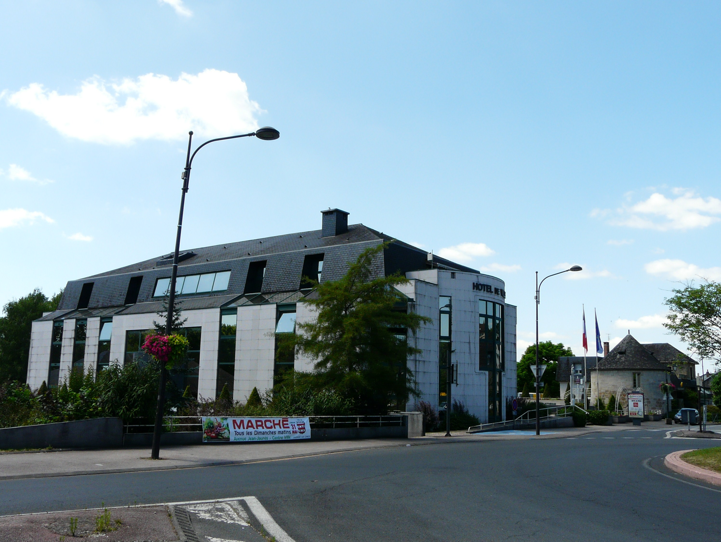 L'hôtel de ville de Malemort-sur-Corrèze, Corrèze, France. Sur sa droite, l'une des deux tours du château de Breniges.